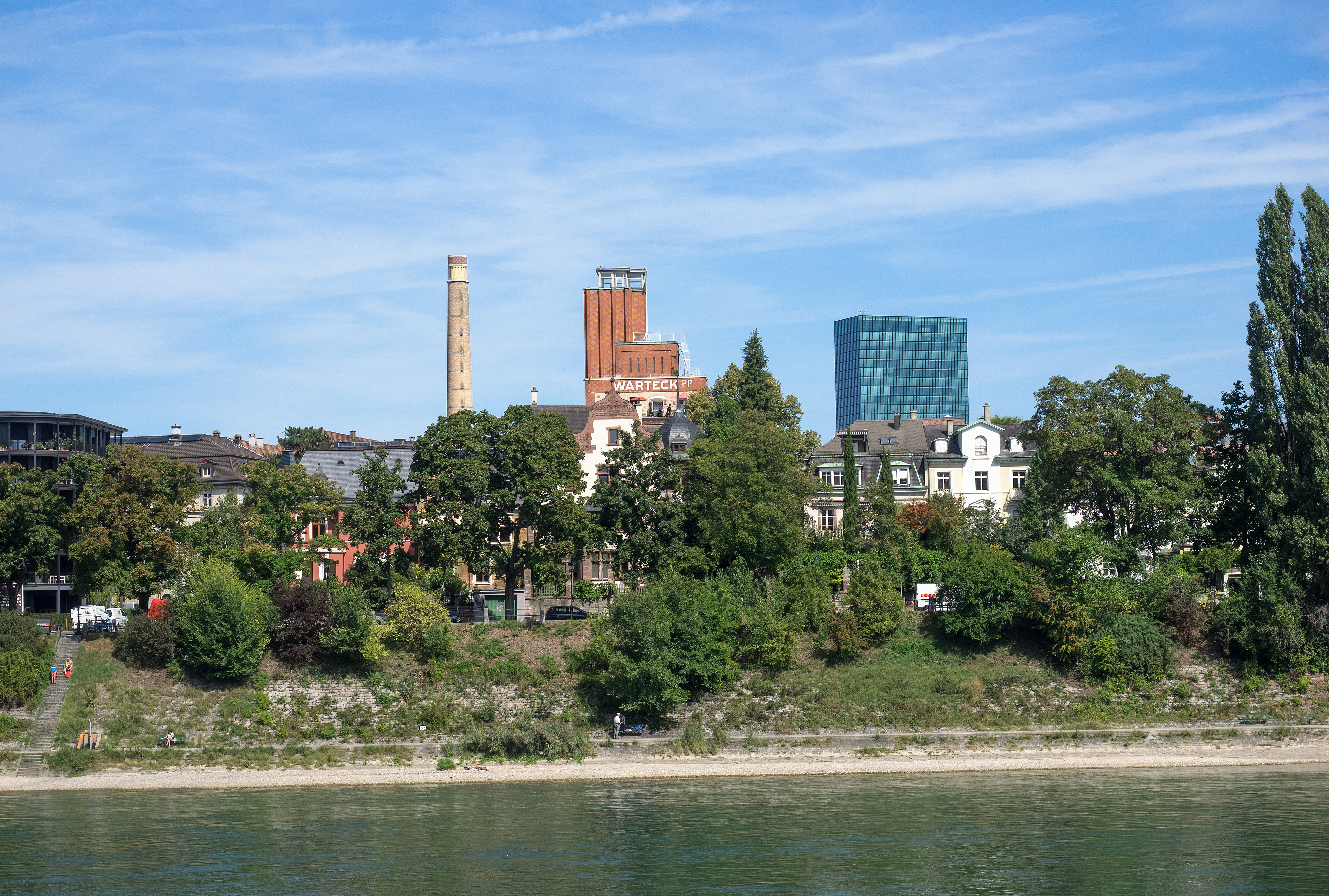 Ehemalige Brauerei Warteck am Burgweg in Basel, vom Grossbasel aus gesehen. Situation 2015.